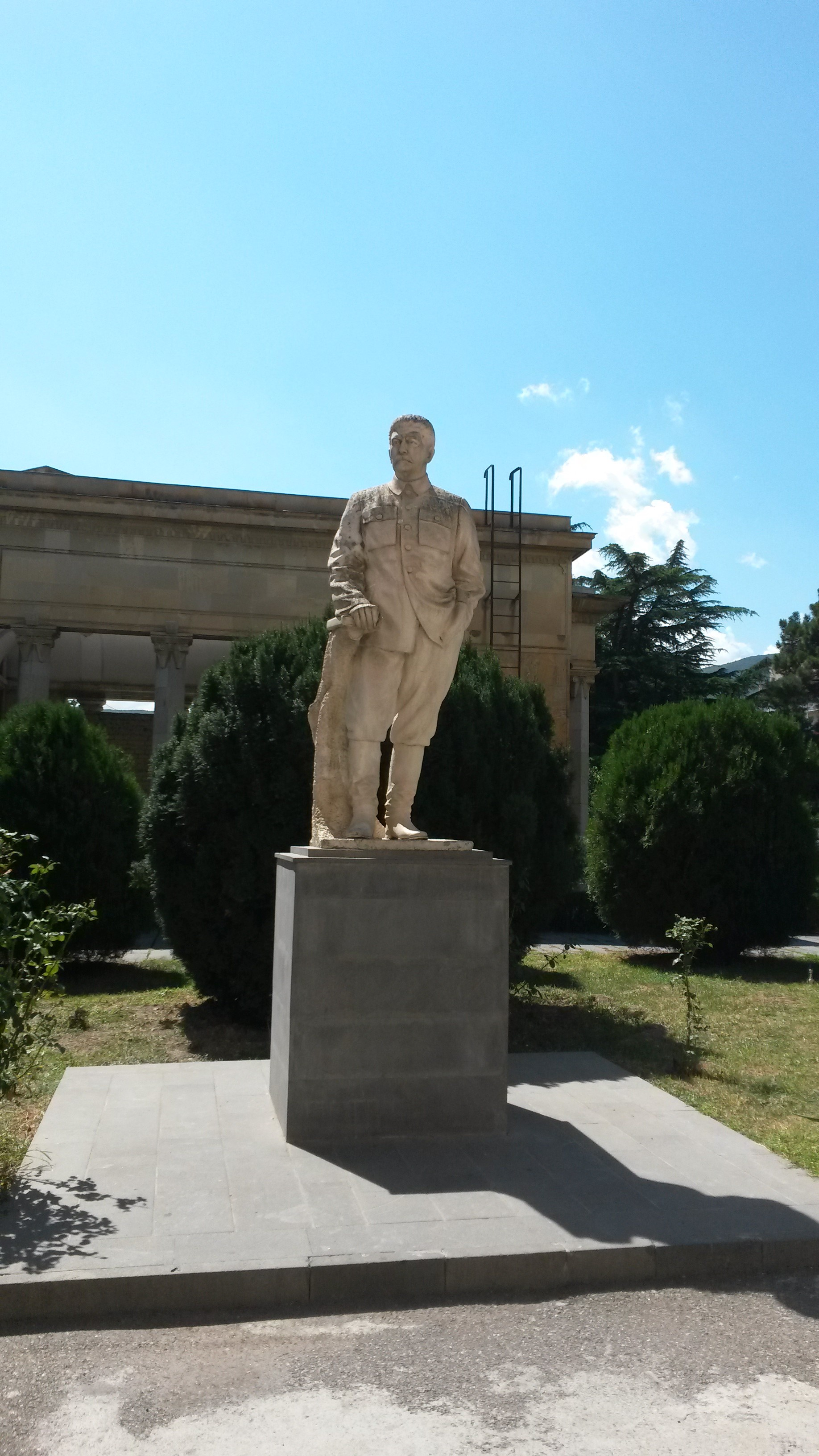 სტალინის მუზეუმი